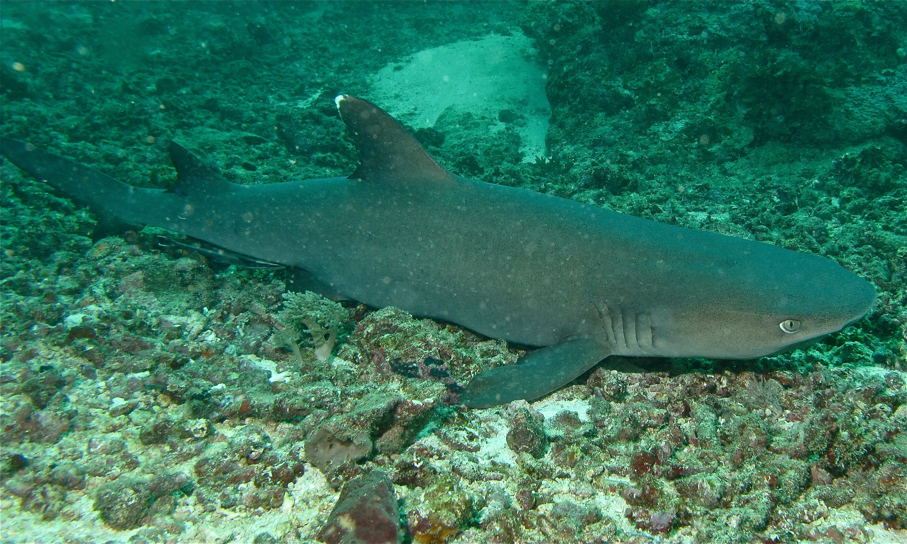 Barracuda Point, Pulau Sipadan, Sabah, MALAYSIA